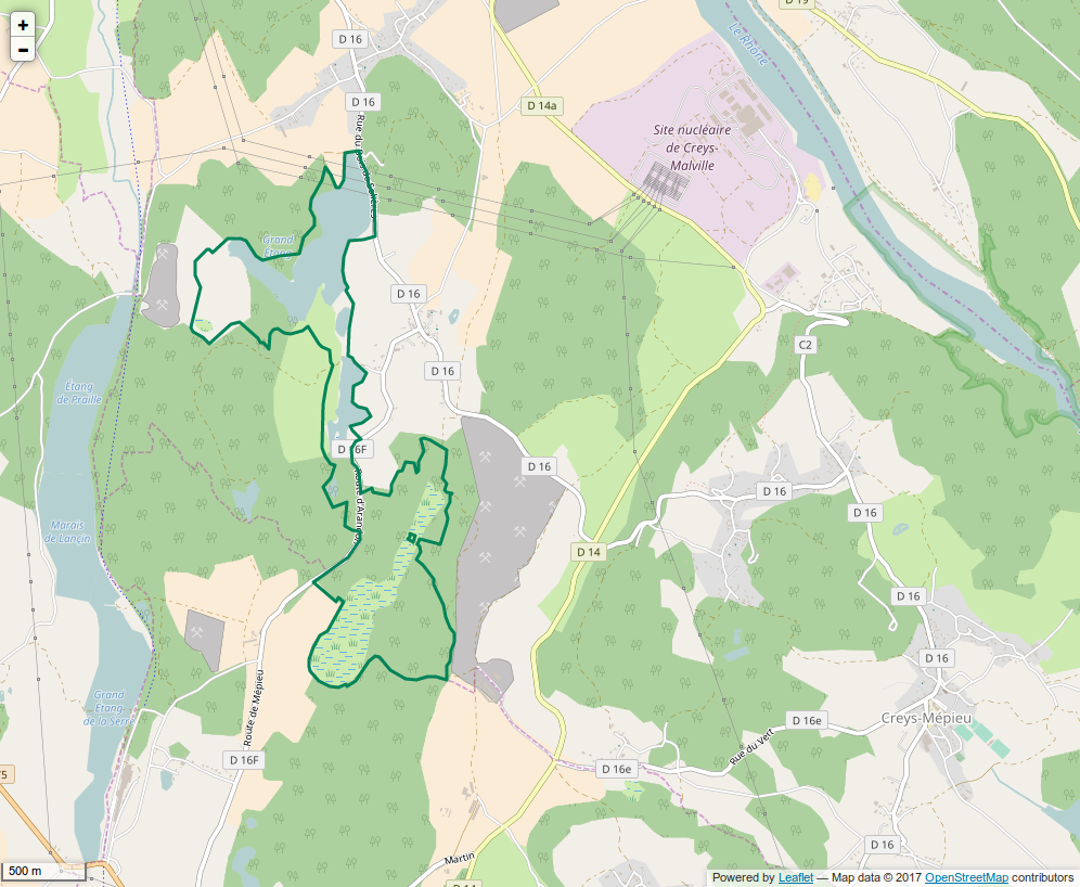 Périmètre de la RNR des Etangs de Mépieu.